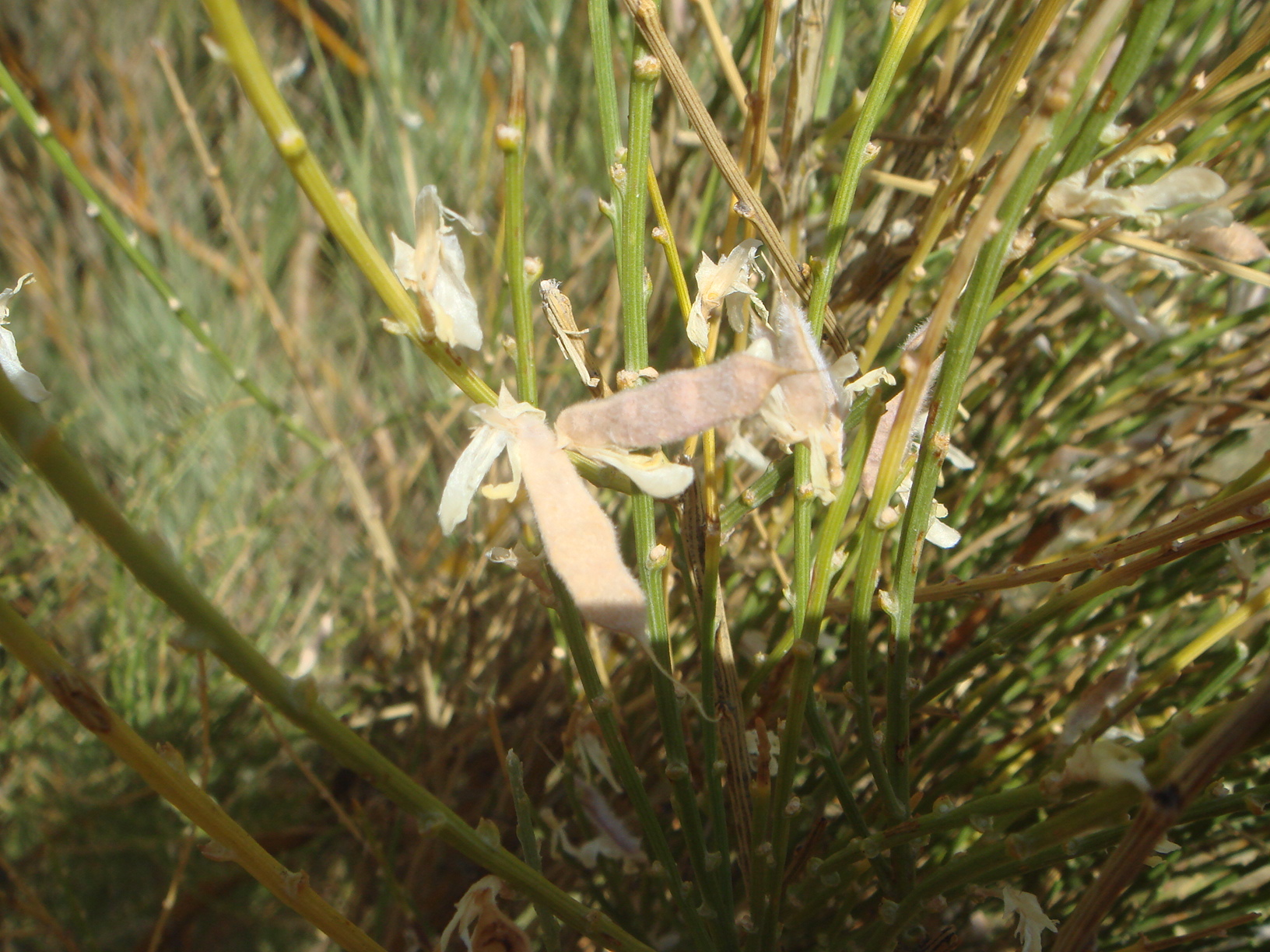 Legumbres de Genista cinerascens, Paramera de Ávila. Villaviciosa, (Ávila), España.